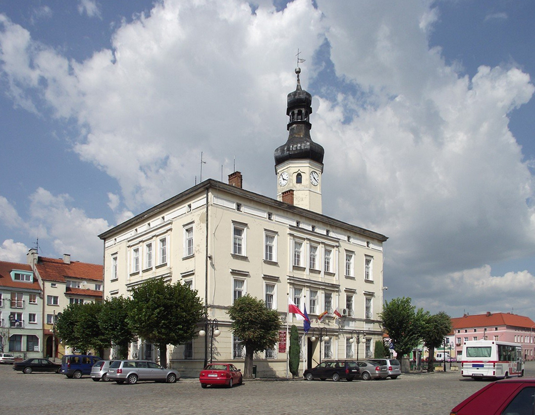 Wiązów, wieża ratusza, 1574-85